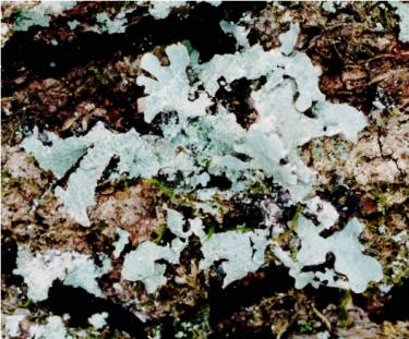 Parmelia sulcata